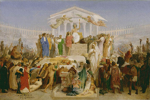 étude pour le siecle d'auguste par Gérôme